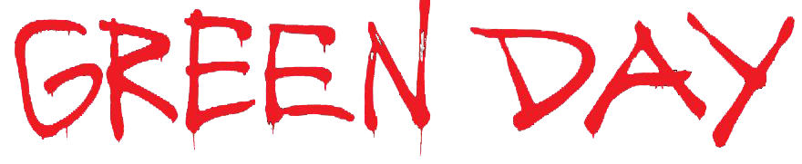 Revolution Radio Logo